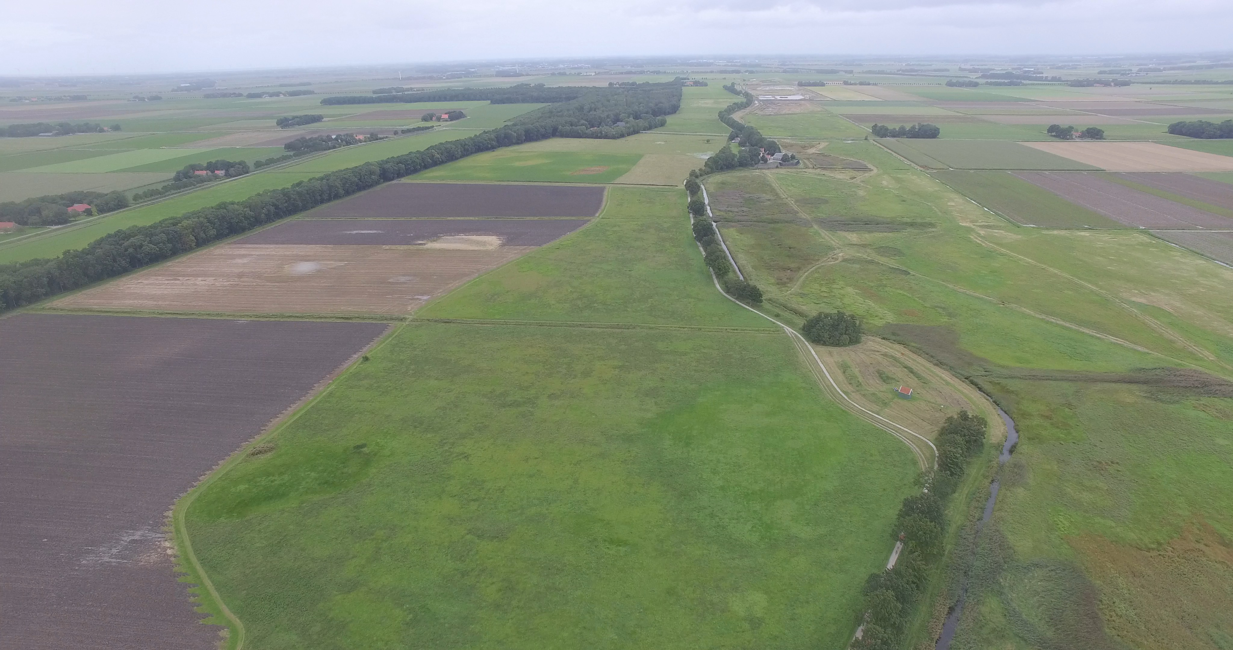 Schokland